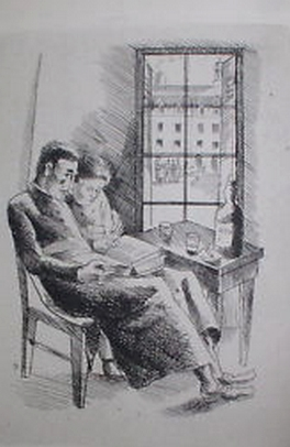 Illustration de Fernand Siméon (1884-1928) pour "Sébastien Roch", roman d'Octave Mirbeau (1848-1917). Éditions A. et G. Mornay, collection « Les Beaux livres », n° 32, 1926.